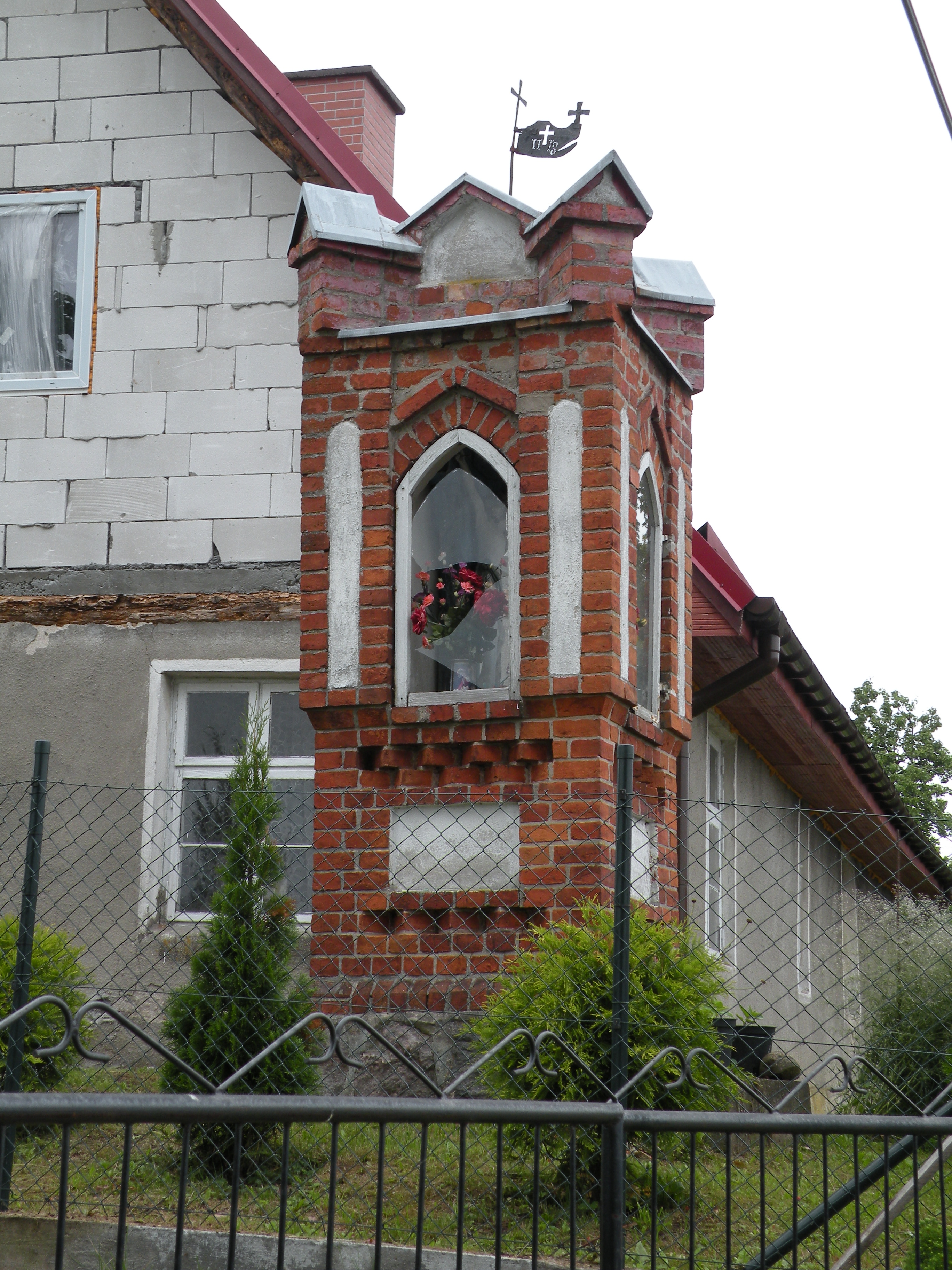 Rzeck koło Biskupca